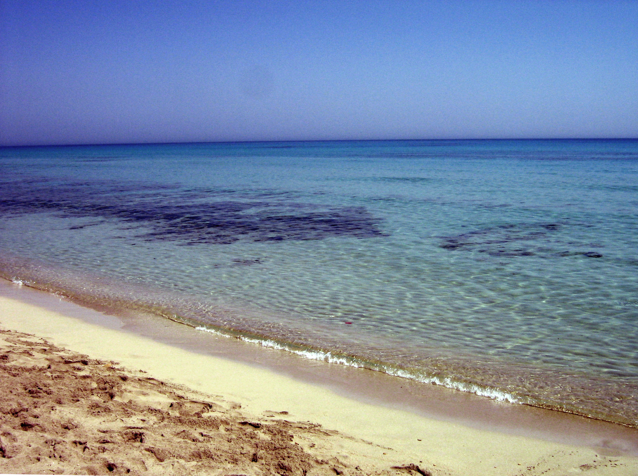 Средиземное море в окрестностях Триполи, Ливия.